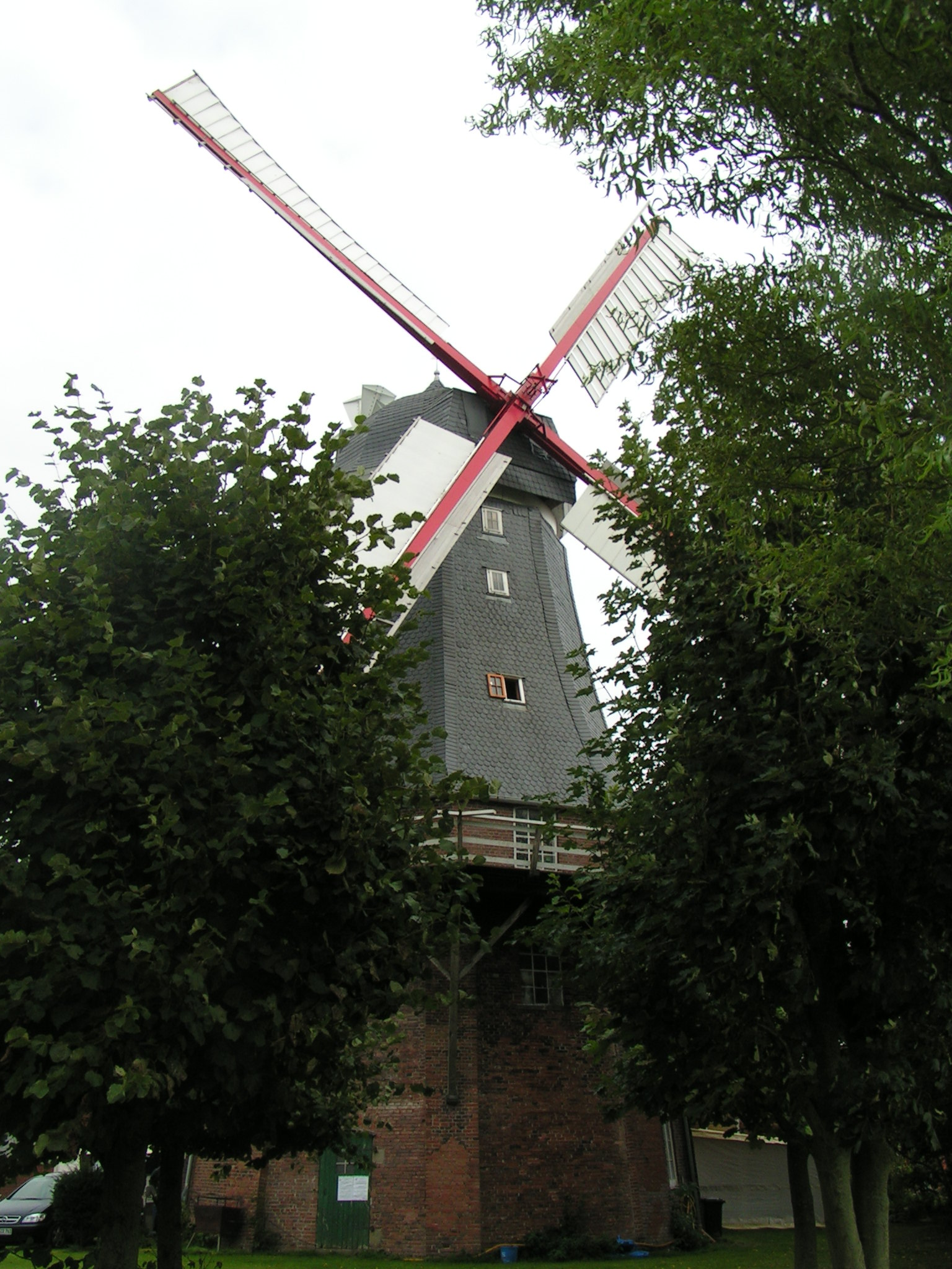 Windmühle Aschwarden (Galerieholländer)